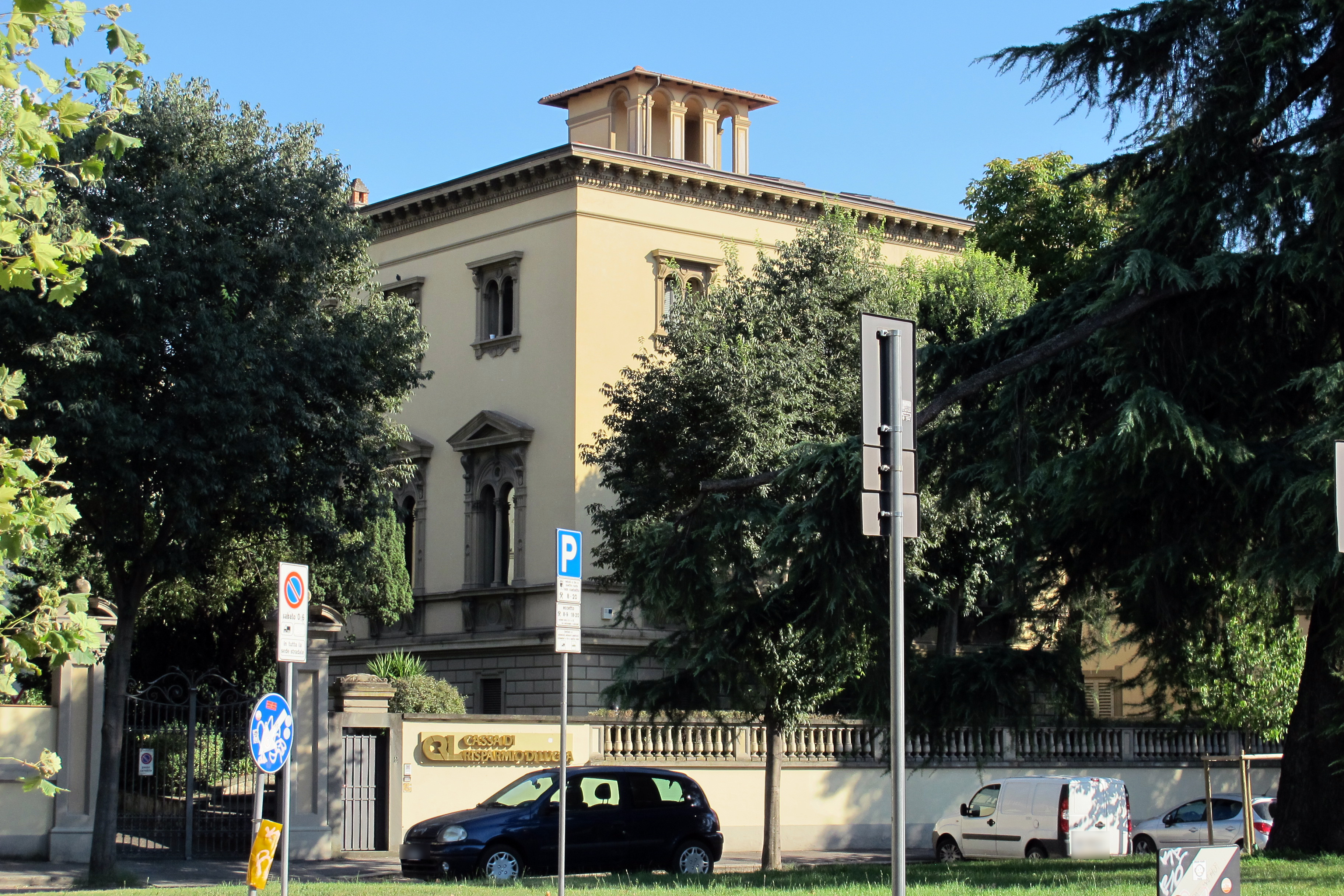 Viale Antonio Gramsci, Firenze